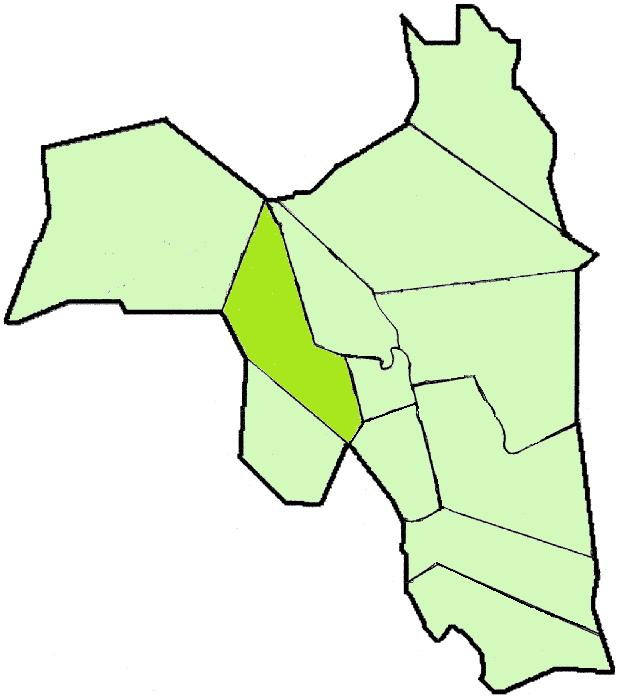 Lapinjärven kartta: Ingermaninkylän sijainti